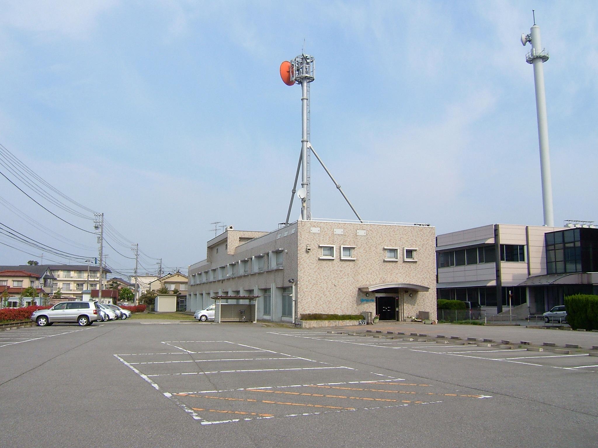 富山エフエム放送本社（富山県富山市）